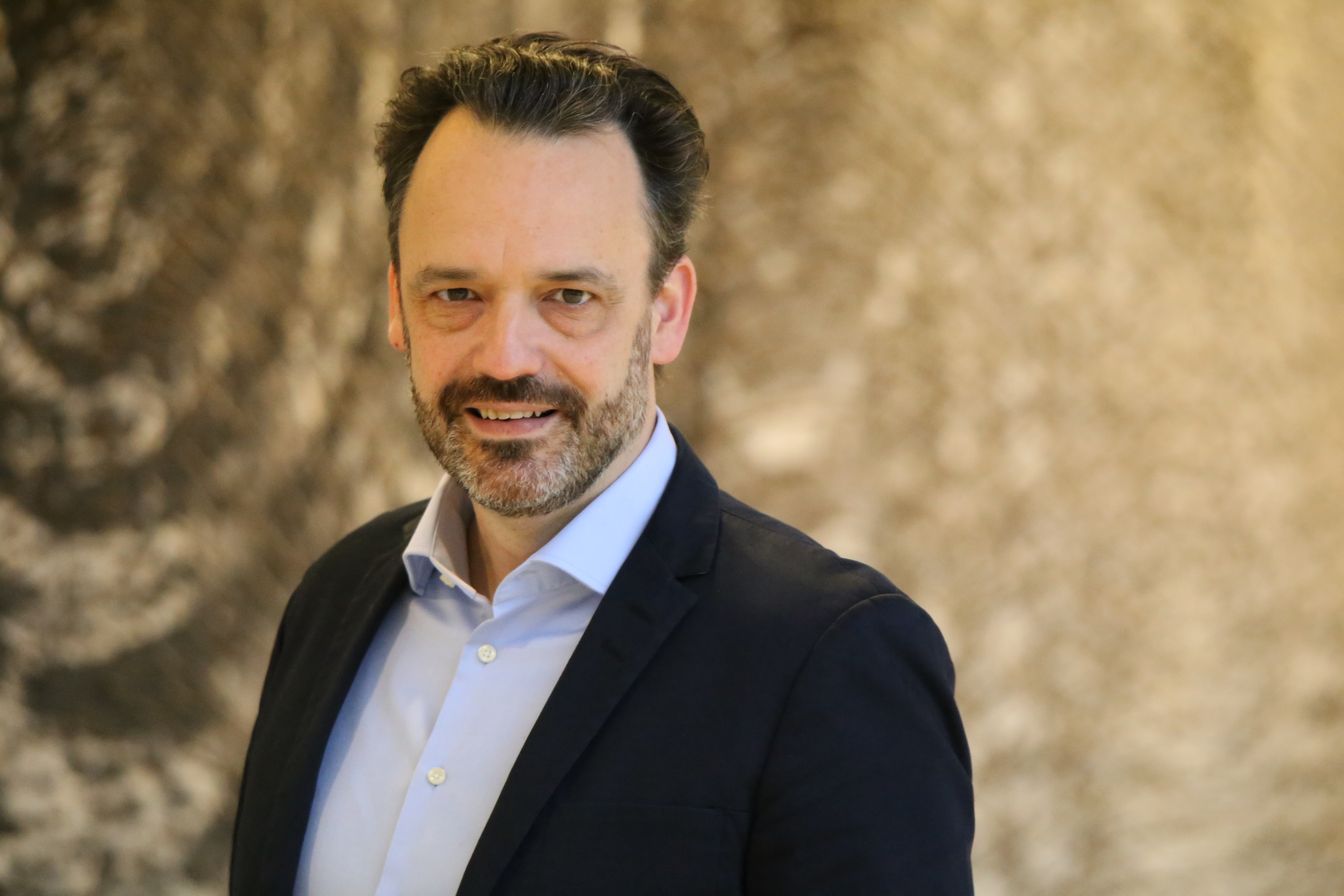 Porträtfoto des Landtagsabgeordneten Lorenz Deutsch